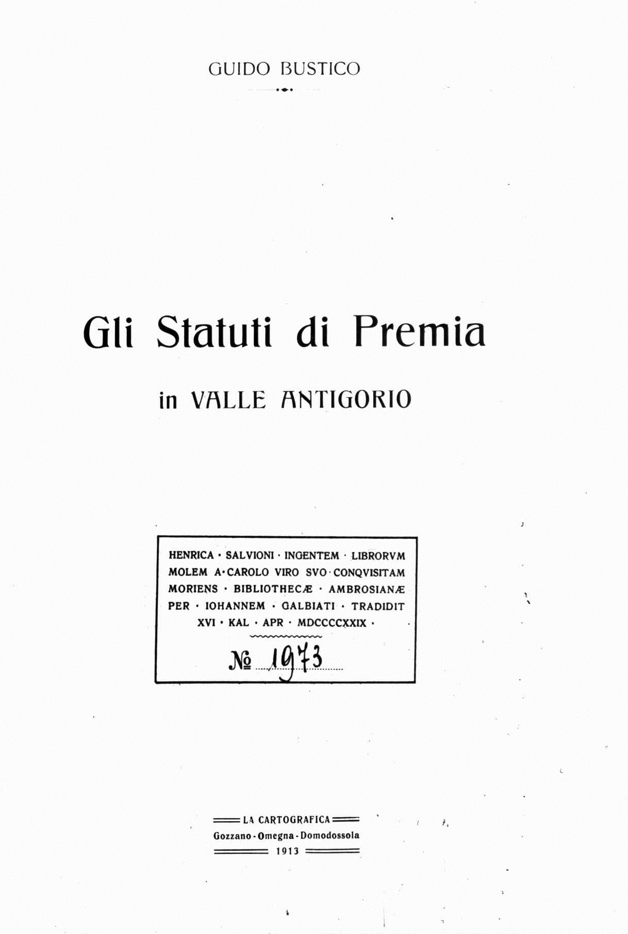 Frontespizio